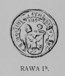 Rawicz Ih